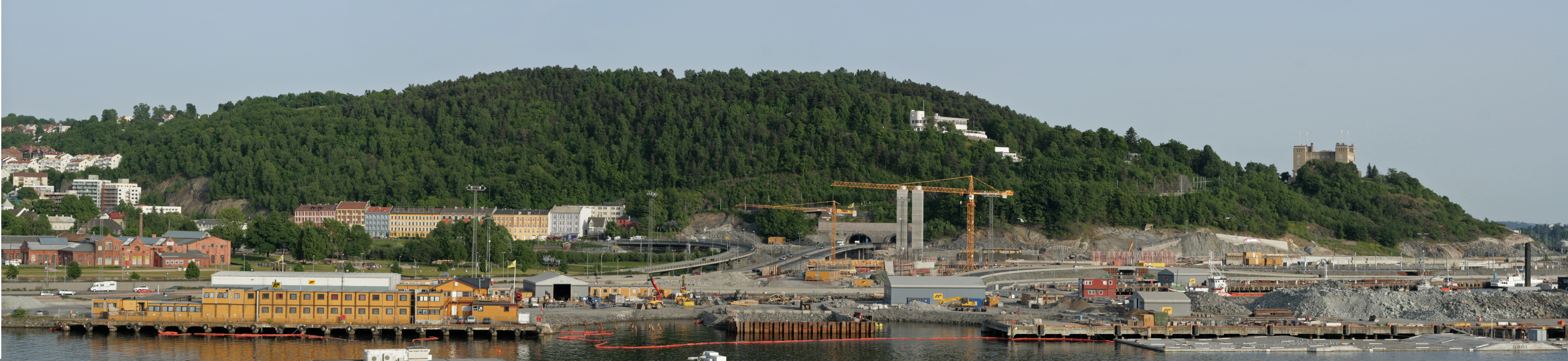 Panorama over Ekeberg, Oslo, sett fra Bjørvika.